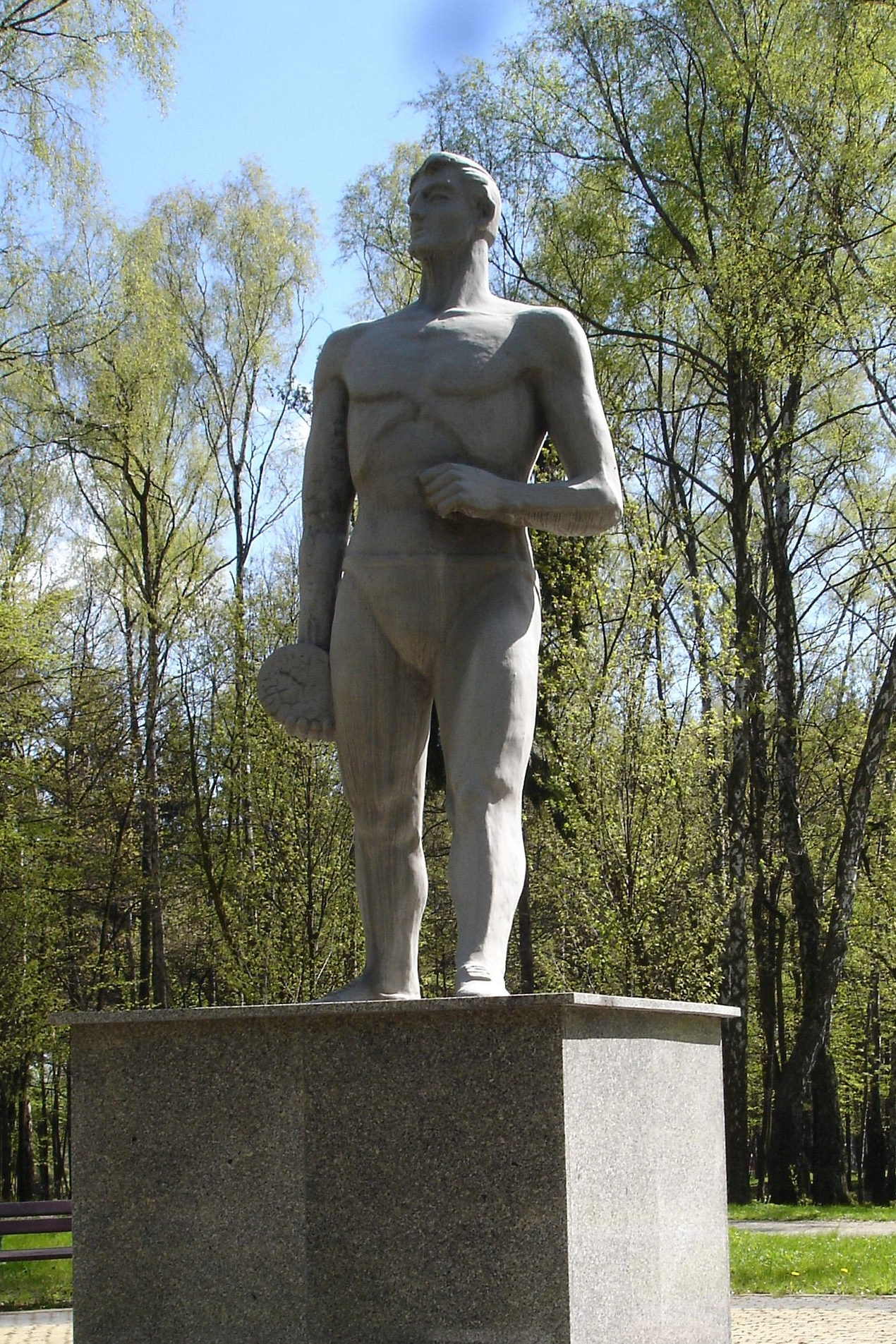 rzeźba (Dyskobol) przy stolikach szachowych w parku w Wojkowicach